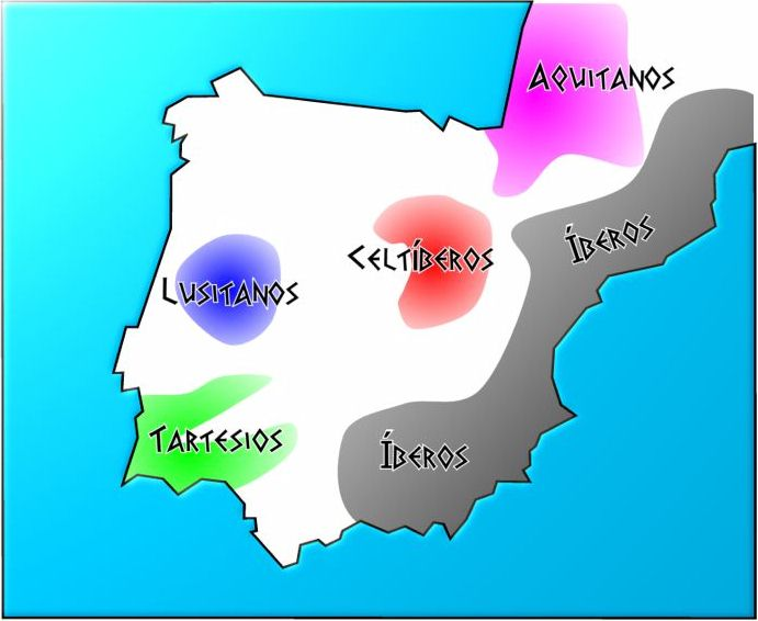 Lenguas prerromanas en la Península Ibérica / Pre-roman languages in de Iberian Peninsula